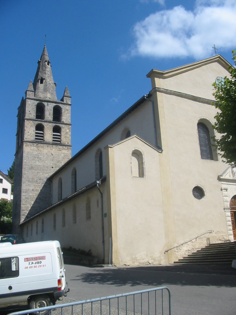 Eglise de Saint Jean en Royans